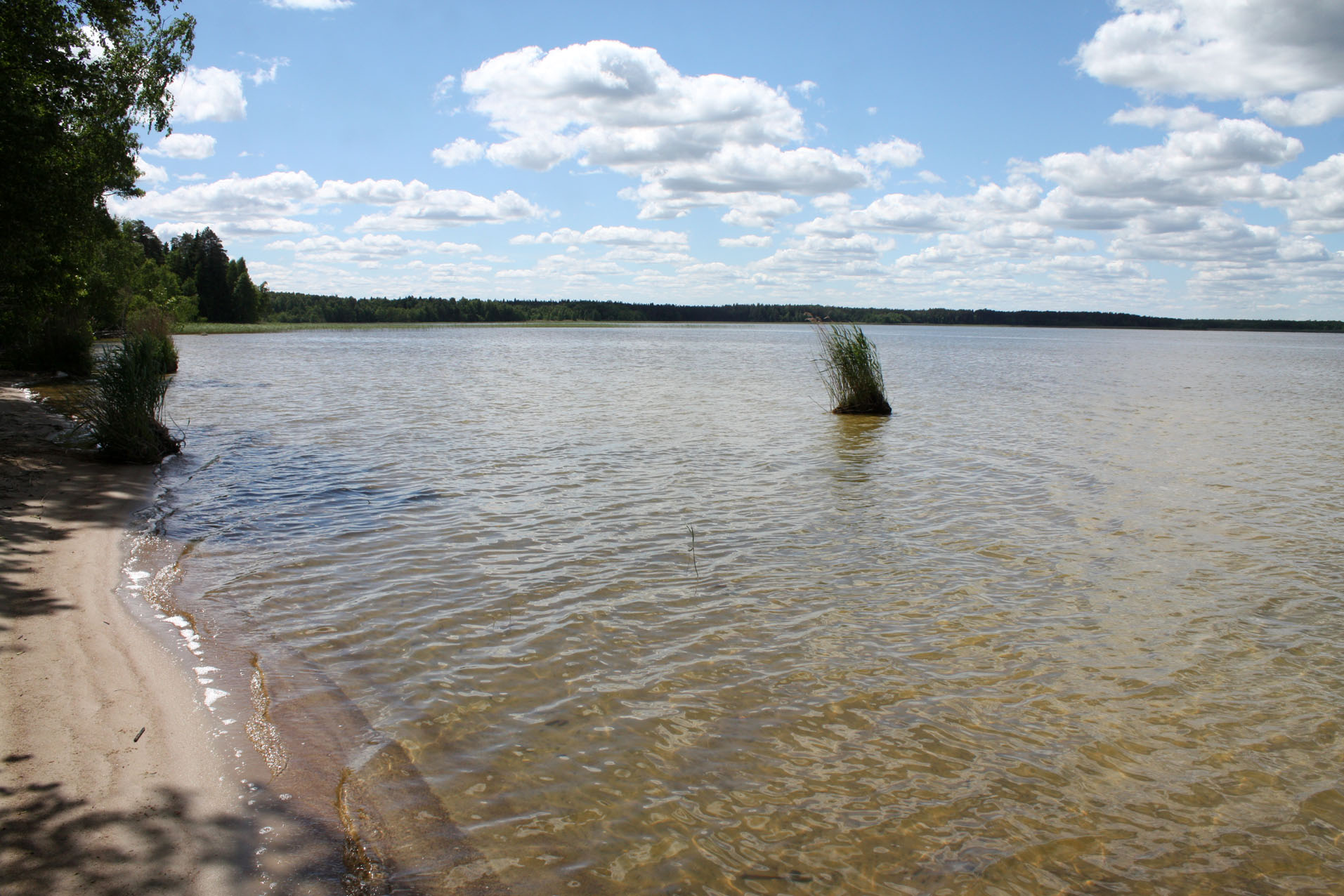 Kertuojos ežero pakrantė 2015 m. vasarą.